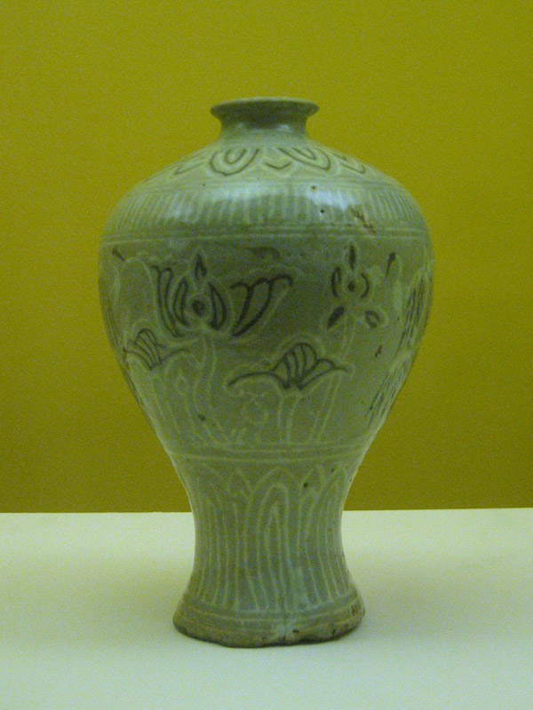 Goryeo celadon, Korea